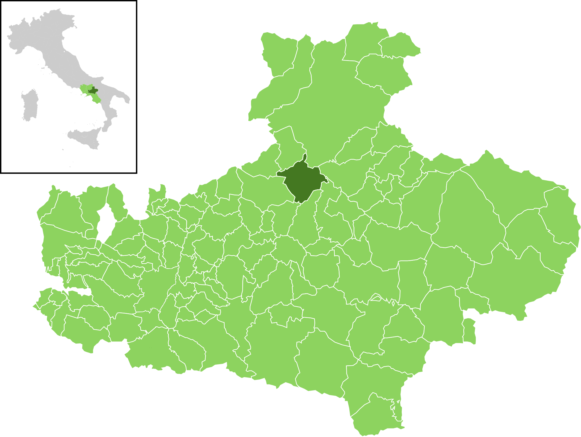 Il comune all'interno della provincia di Avellino